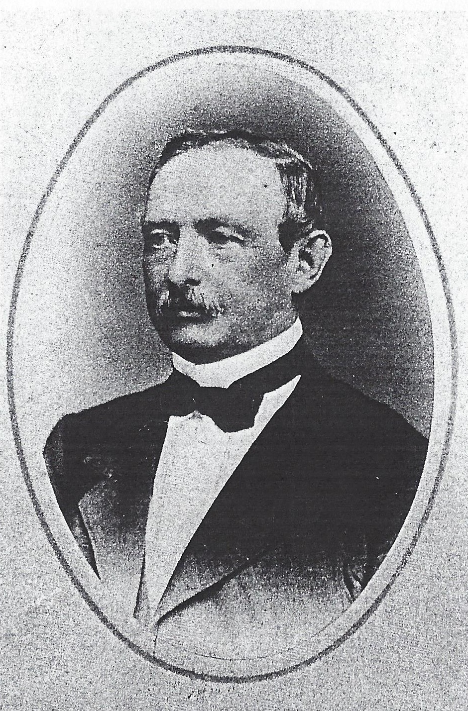 Porträtfotografie von Carl von Schwendler (1812-1880)